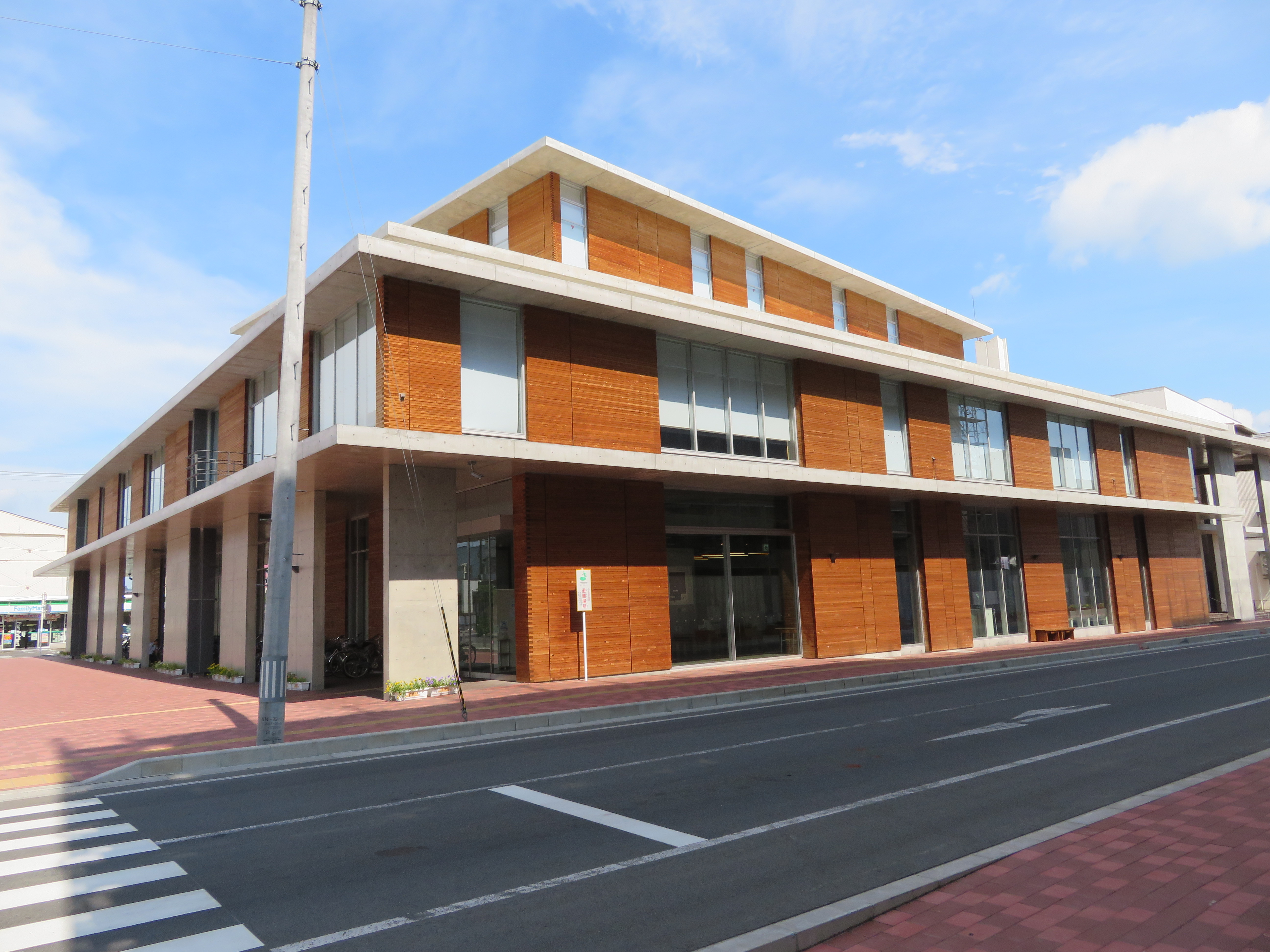 よねざわ市民ギャラリーと米沢市立米沢図書館が所在するナセBA Canon PowerShot SX720 HS